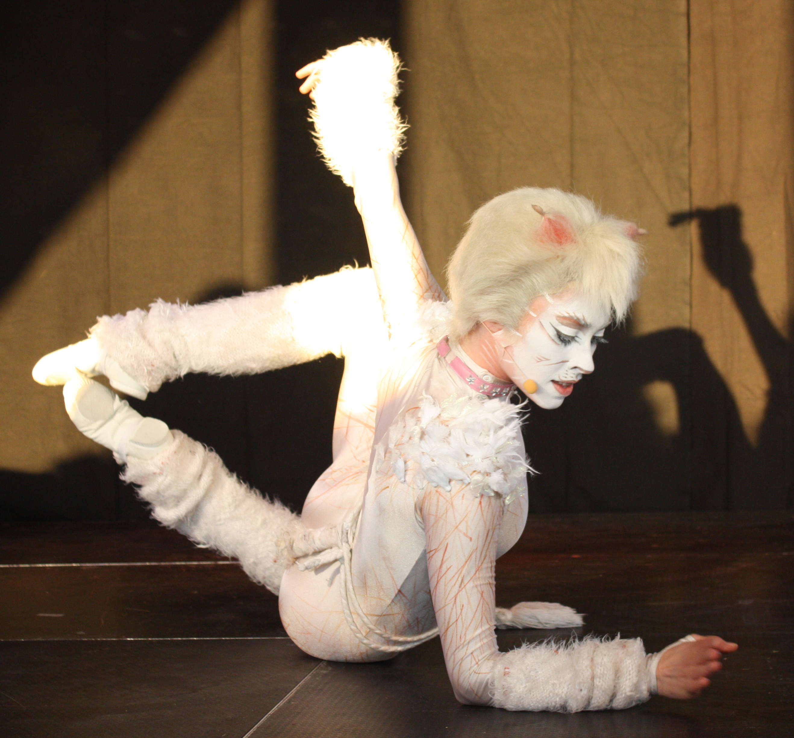 Cats in Mannheim